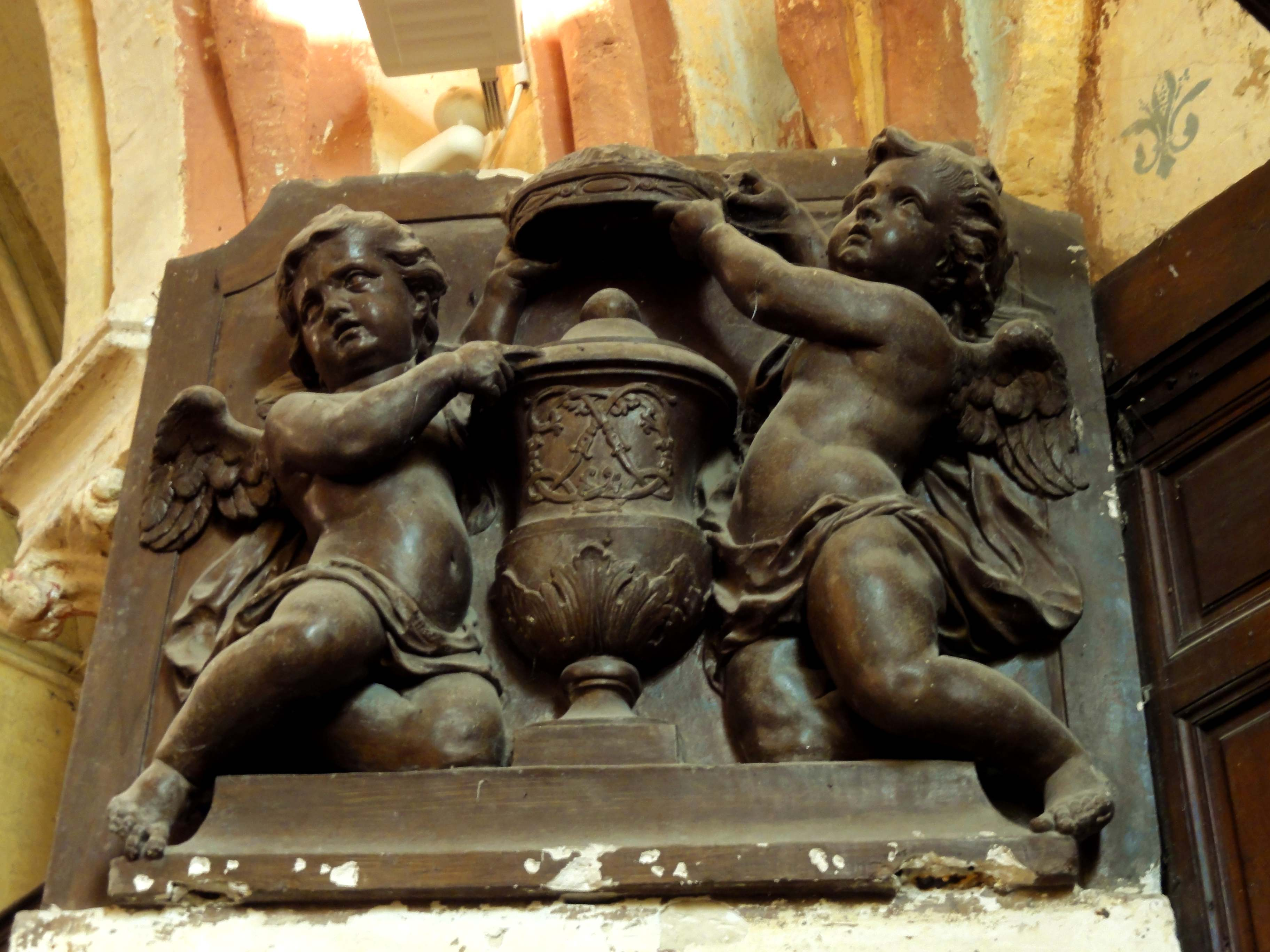 Mobilier de l'église (voir titre).